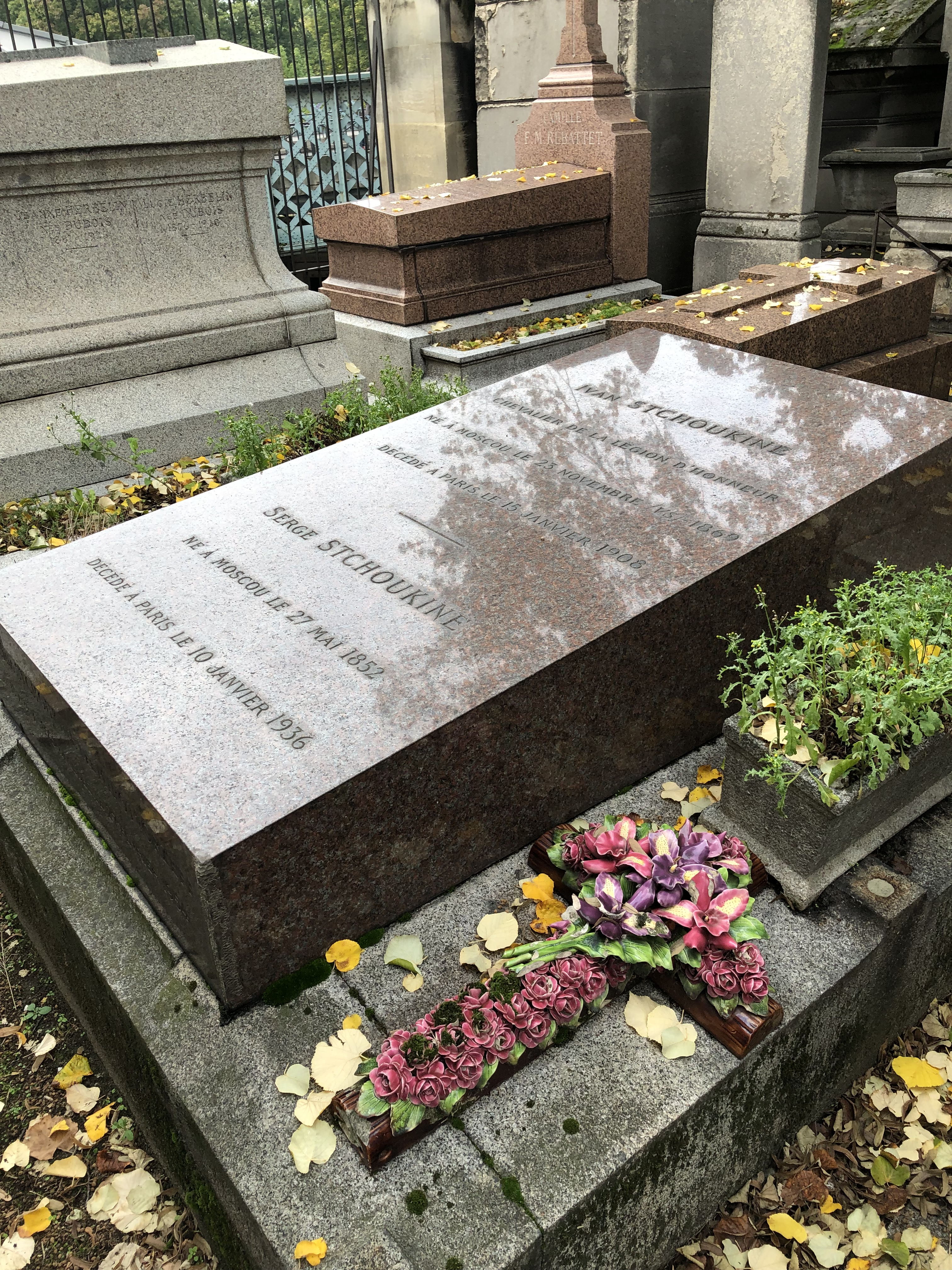 Фотография надгробия Сергея Ивановича Щукина сделаннаю мною лично в Париже на кладбище Монмартра.